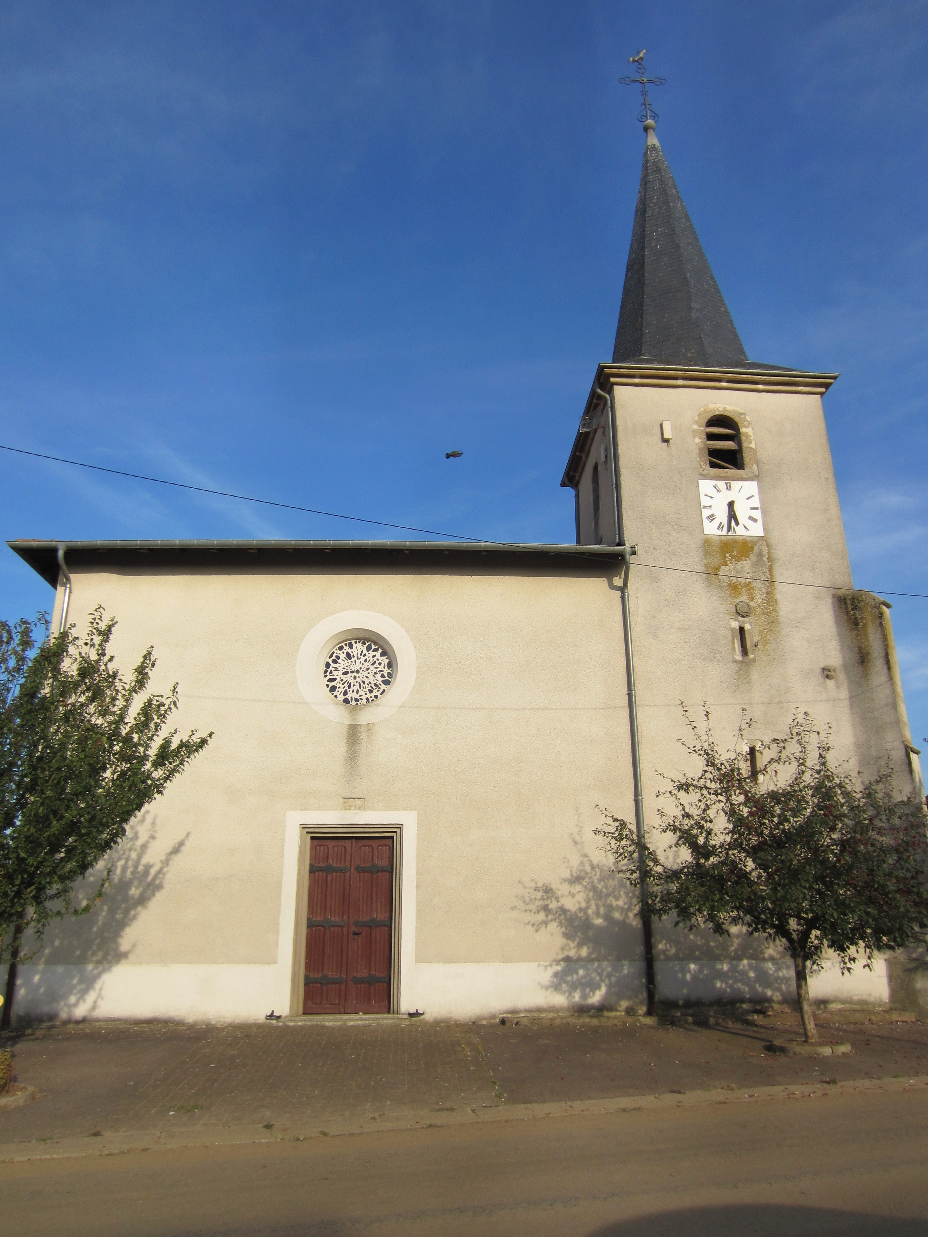 Description Église paroissiale Saint-Maximin Sponville Église paroissiale Saint-Maximin Sponville